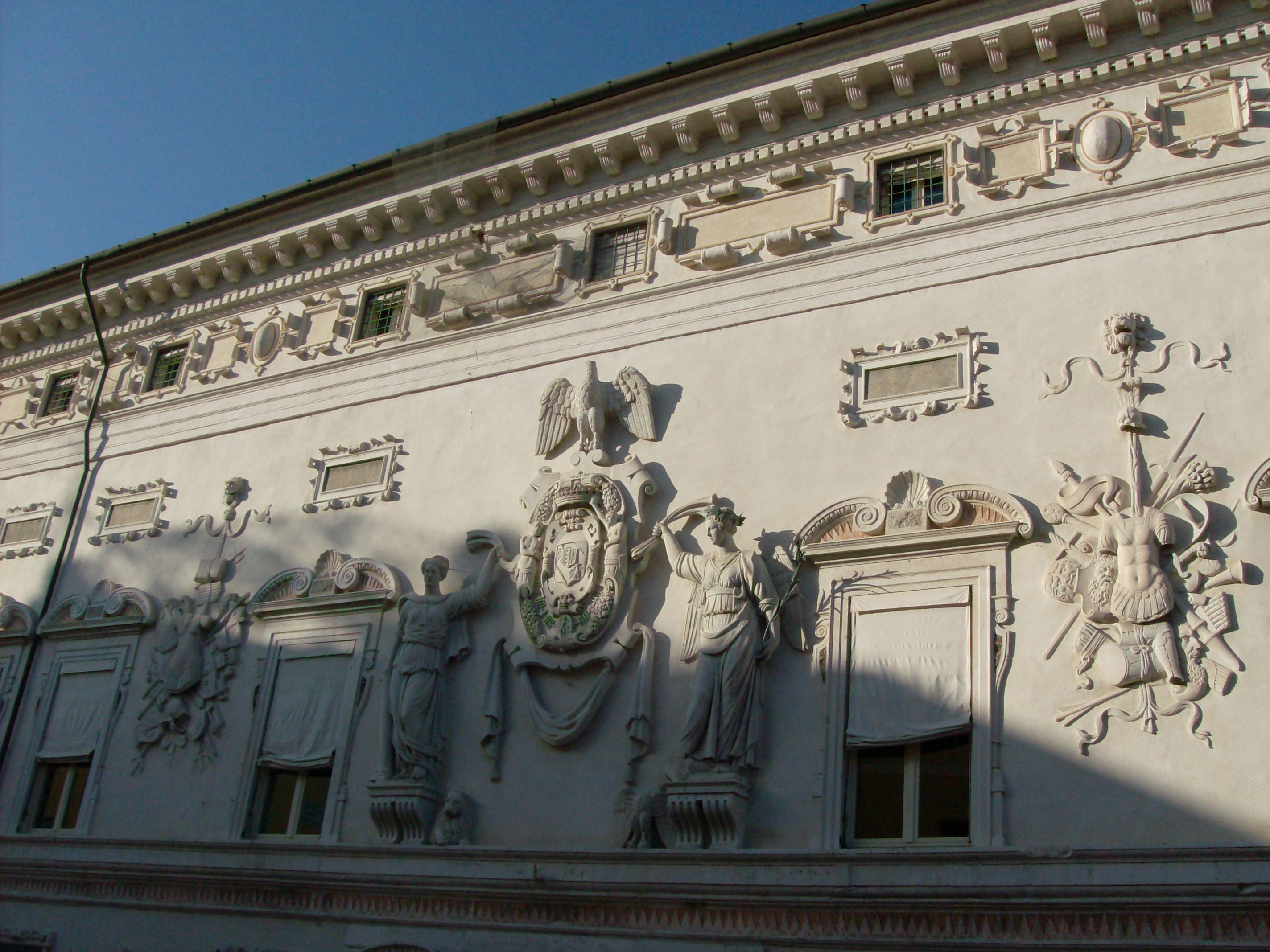 Il Palazzo Bentivoglio a Ferrara in via Garibaldi